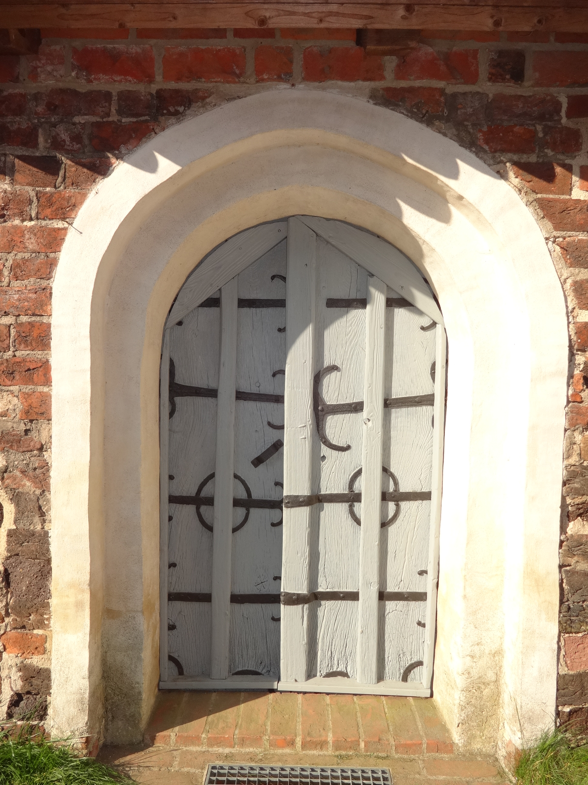 Tür zur Dorfkirche in Schönborn-Lindena